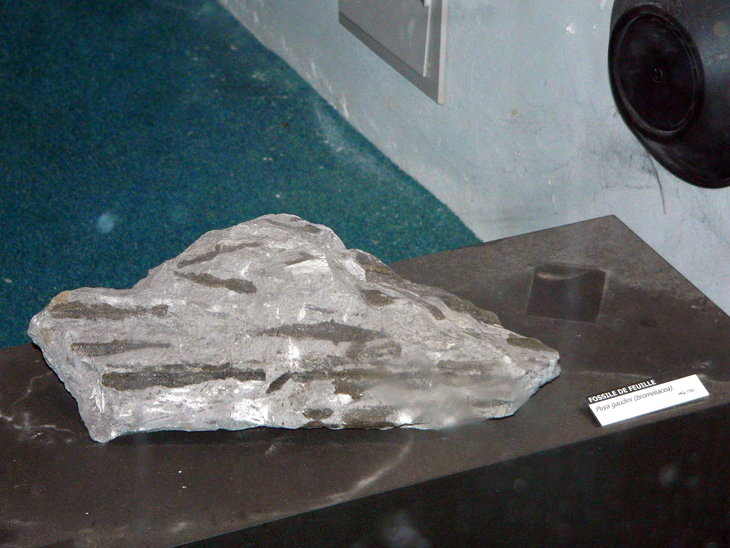 ein oder mehrere versteinerte (fossile/fossilisierte) Blätter eines Ananasgewächses (oder einer Bromelie, genauer Puya gaudini (bromeliacea))